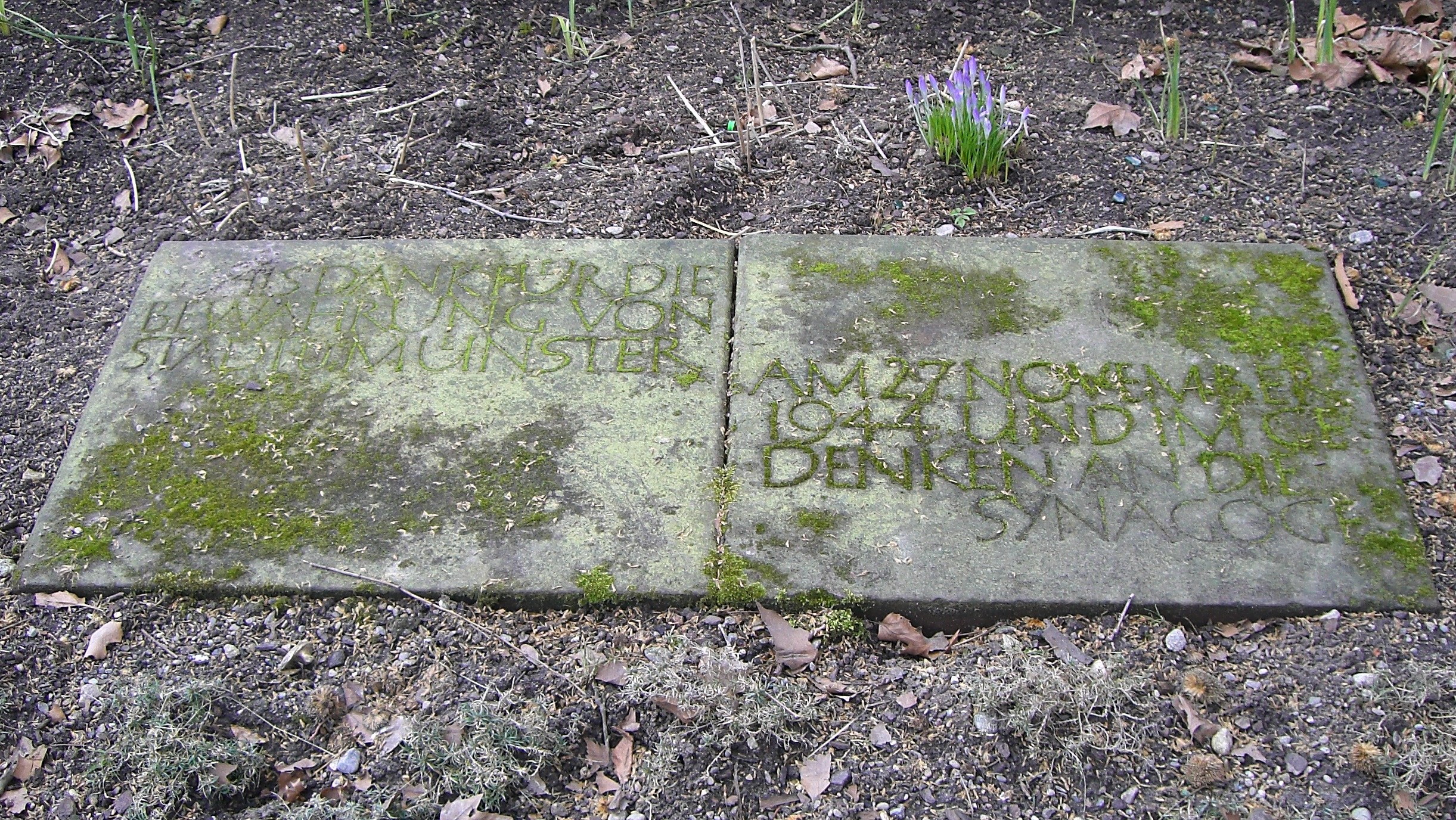 Vor dem Kollegiengebäude II der Universität Freiburg befindet sich eine vom Verlag Herder gestiftete Gedenkstelle. Zwei liegende Steinplatten tragen die Inschrift: "Als Dank für die Bewahrung von Stadt und Münster am 27. November 1944 und im Gedenken an die Synagoge."